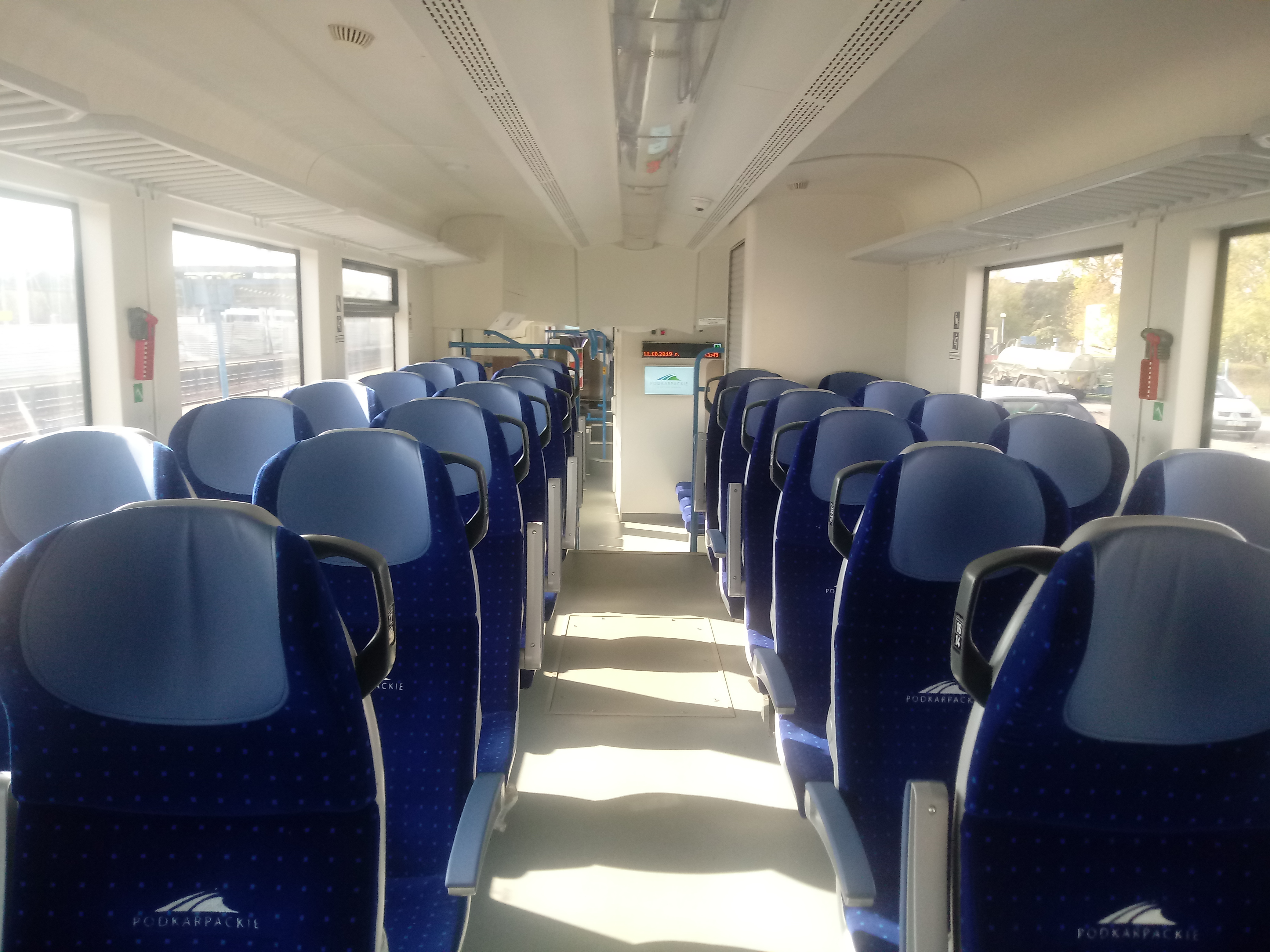 Wnętrze autobusu szynowego SA135-012